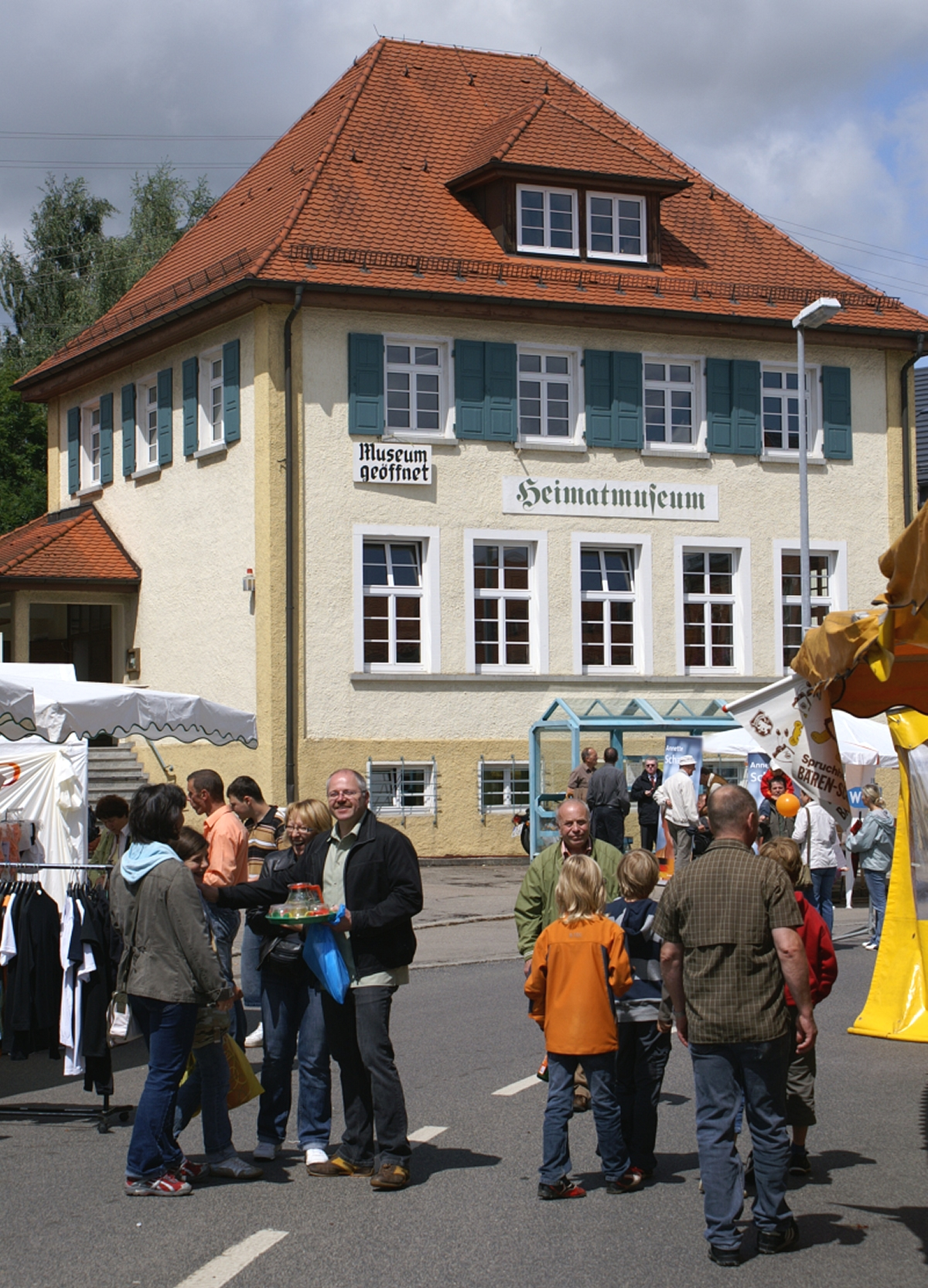 Das Nellinger Heimatmuseum vermittelt ein eindrucksvolles Bild vom Arbeiten und Leben auf der Schwäbischen Alb in früheren Zeiten. Das Museum ist von April bis Oktober an jedem 1. Sonntag im Monat sowie am Nellinger Jakobi-Markt geöffnet.